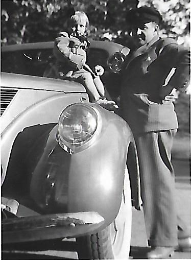 Eri, Tom ja Lincoln Zephyr